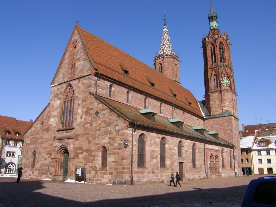 Villinger Münster Unserer Lieben Frau